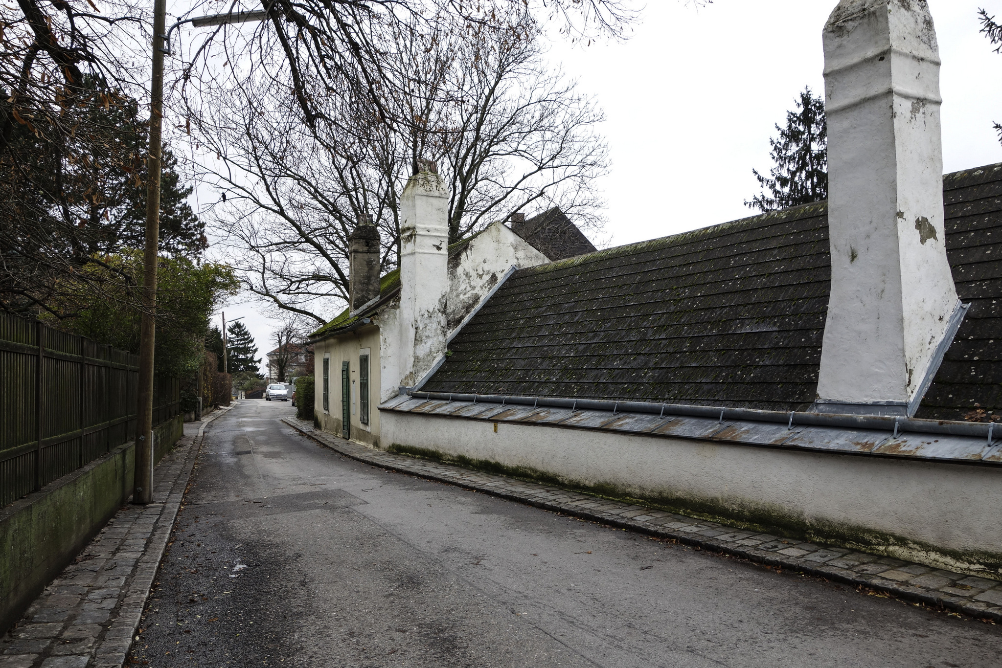 Dieses romantische Häuschen in Salmannsdorf wurde im Jahr 2019 abgerissen. 'Salmannsdorf' (Q1255079)